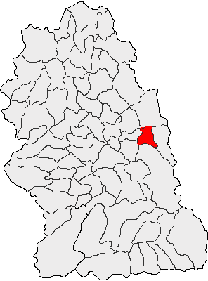 Categorie:Hărţi ale judeţului Hunedoara